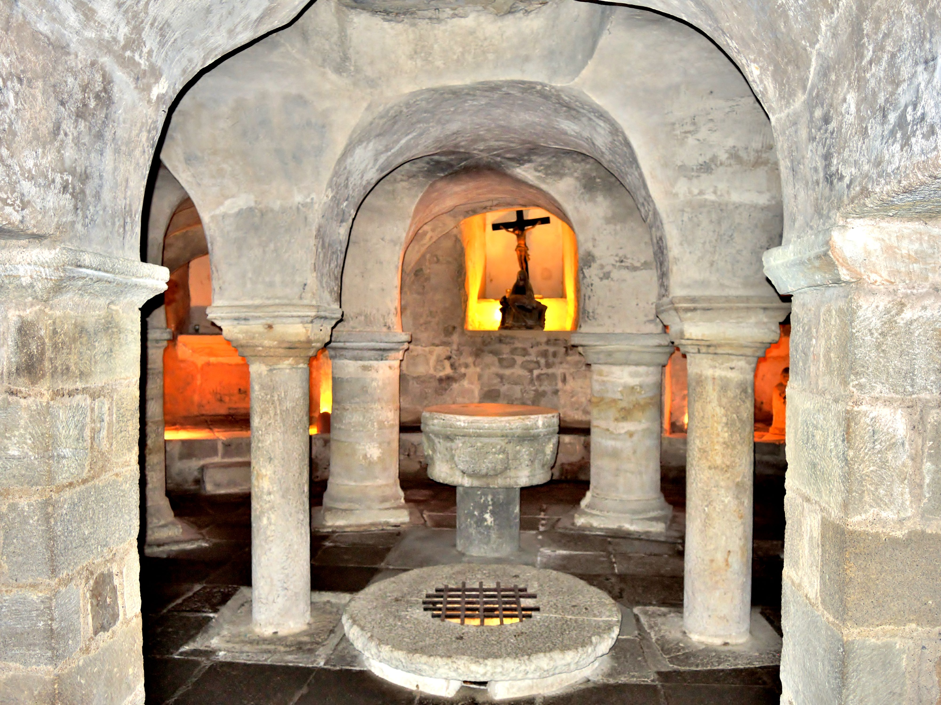 Crypte de l'église Saint Cerneuf. Billom. Puy-de-Dôme